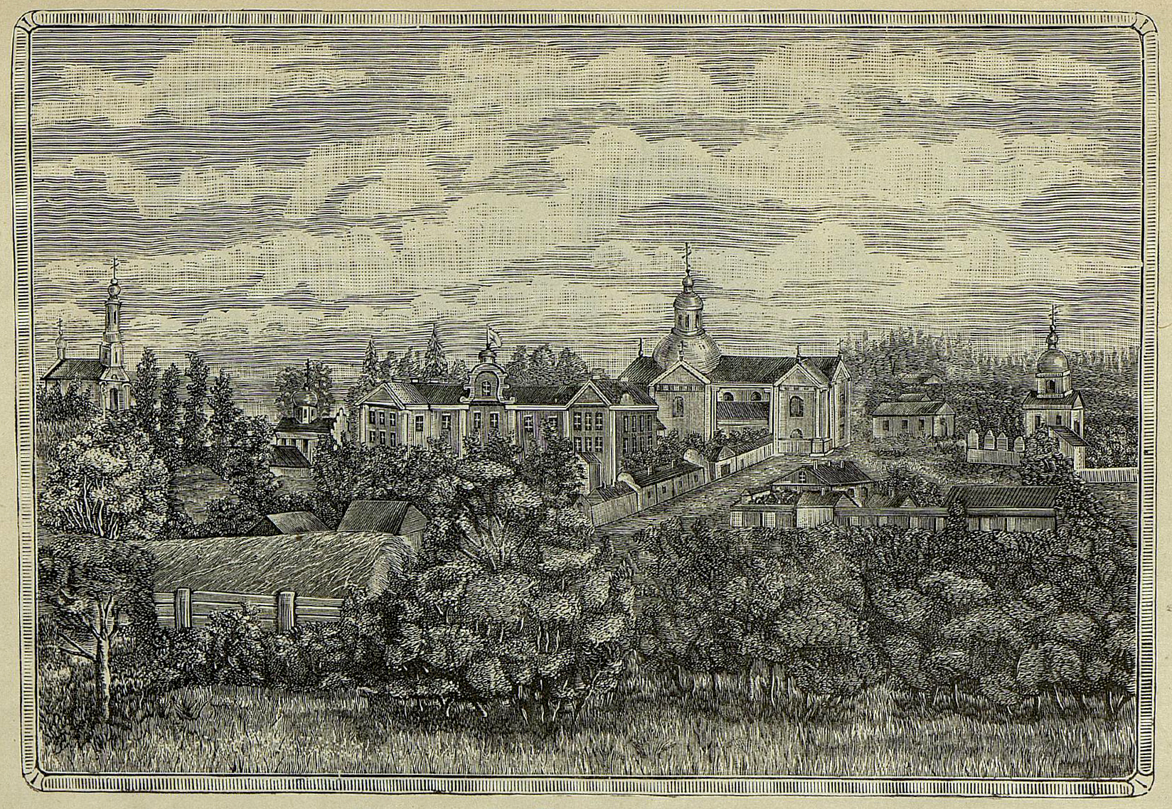 Беларуская (тарашкевіца): Жыровічы (Žyrovičy). Манастыр